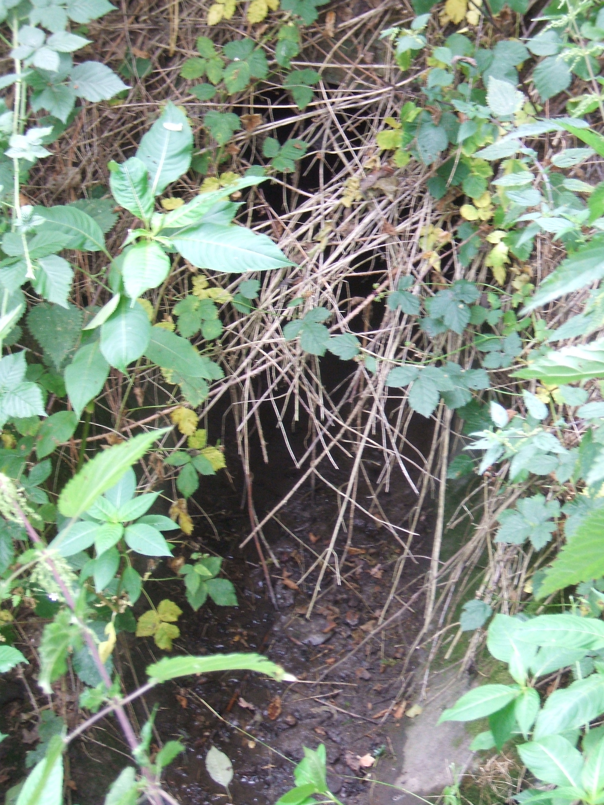 Abflussrinne abwärts nach Osten, in die der Schiefertalbach unter der B 275 hindurch mündet, diese begleitend